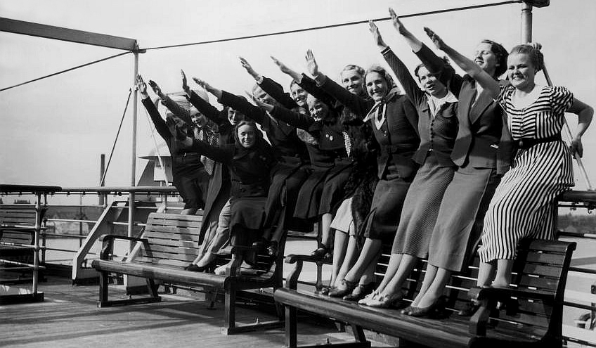 Reise auf dem KdF-Schiff "Wilhelm Gustloff", 1938. NS-Propagandabild